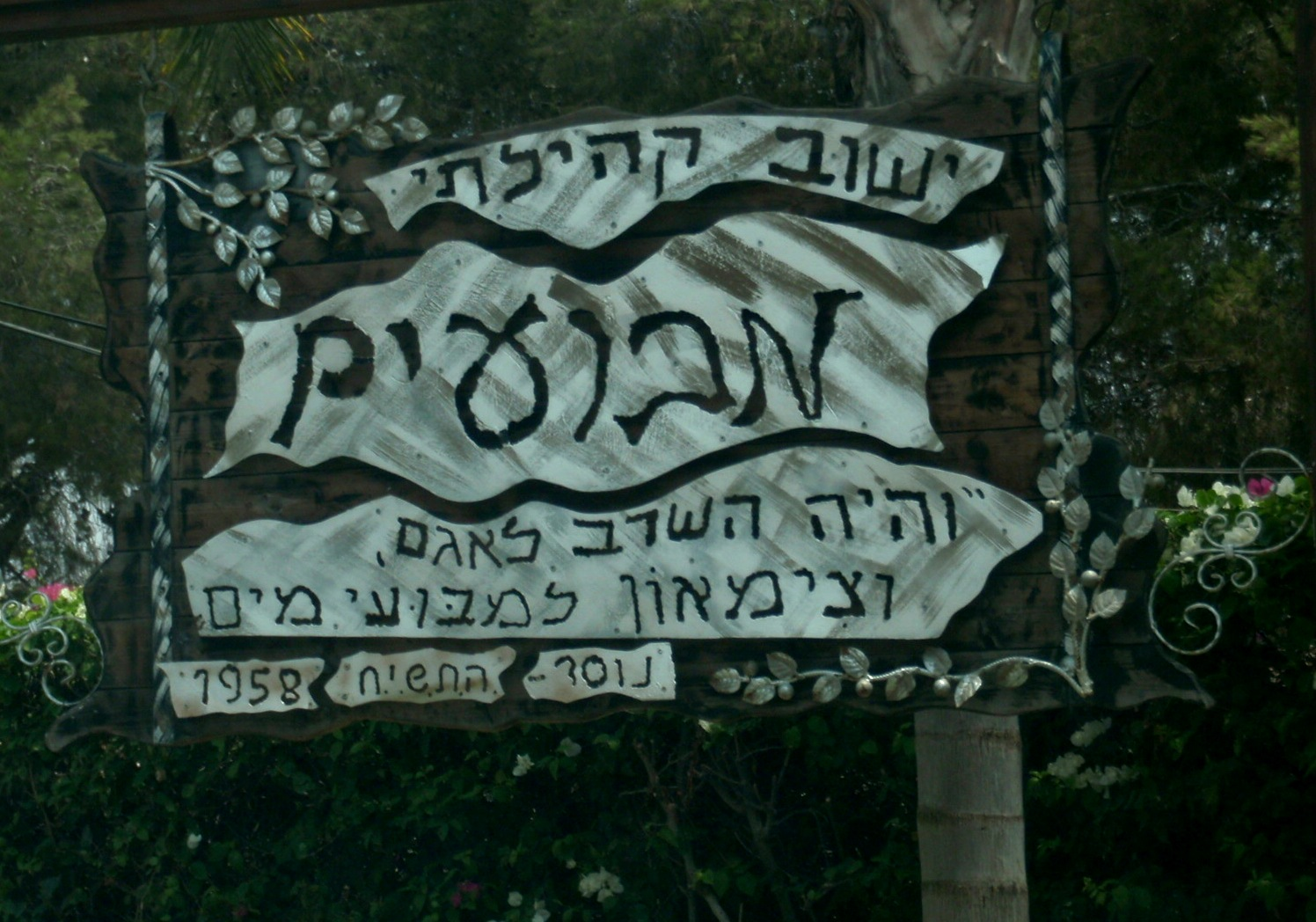 שלט הכניסה למבועים